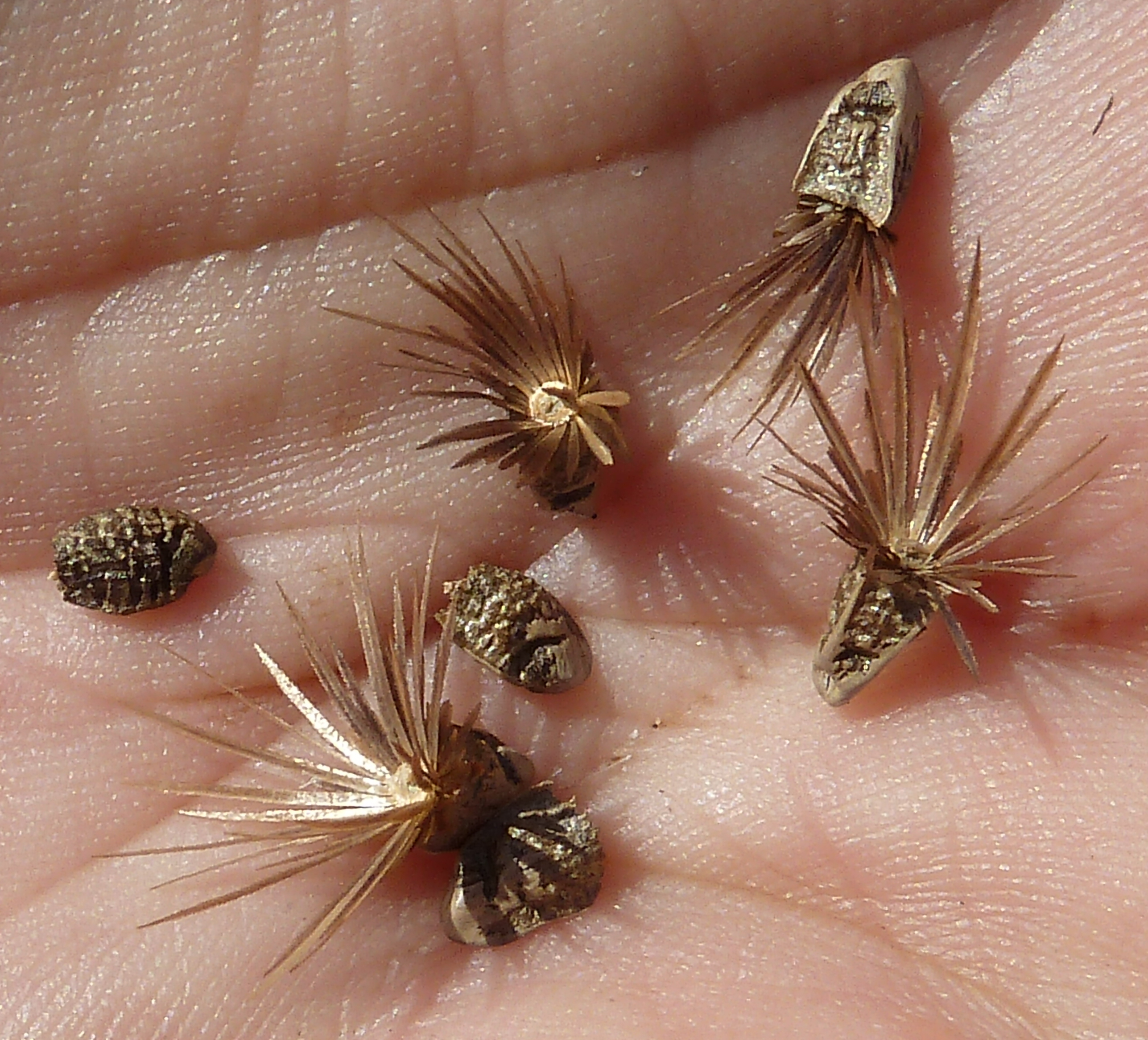 Carthamus lanatus : Frutos, exteriores (sin vilano) e interiores (con doble vilano) - Cabezo de Pallarés, Albatera (Alicante, España).